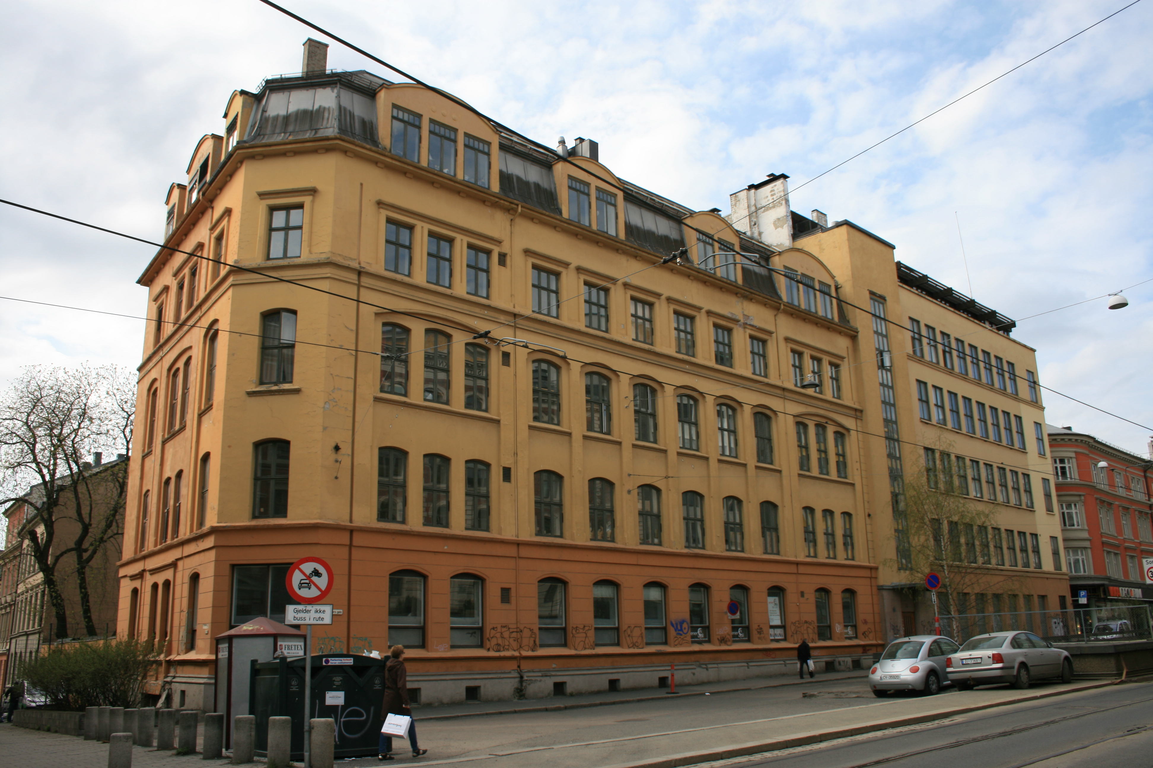 Statens lærerhøgskole i forming, Oslo